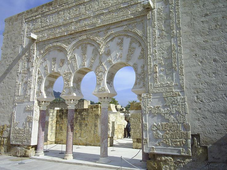 La llamada puerta del primer ministro en Medina Azahara, antigua ciudadela cerca de Córdoba. España